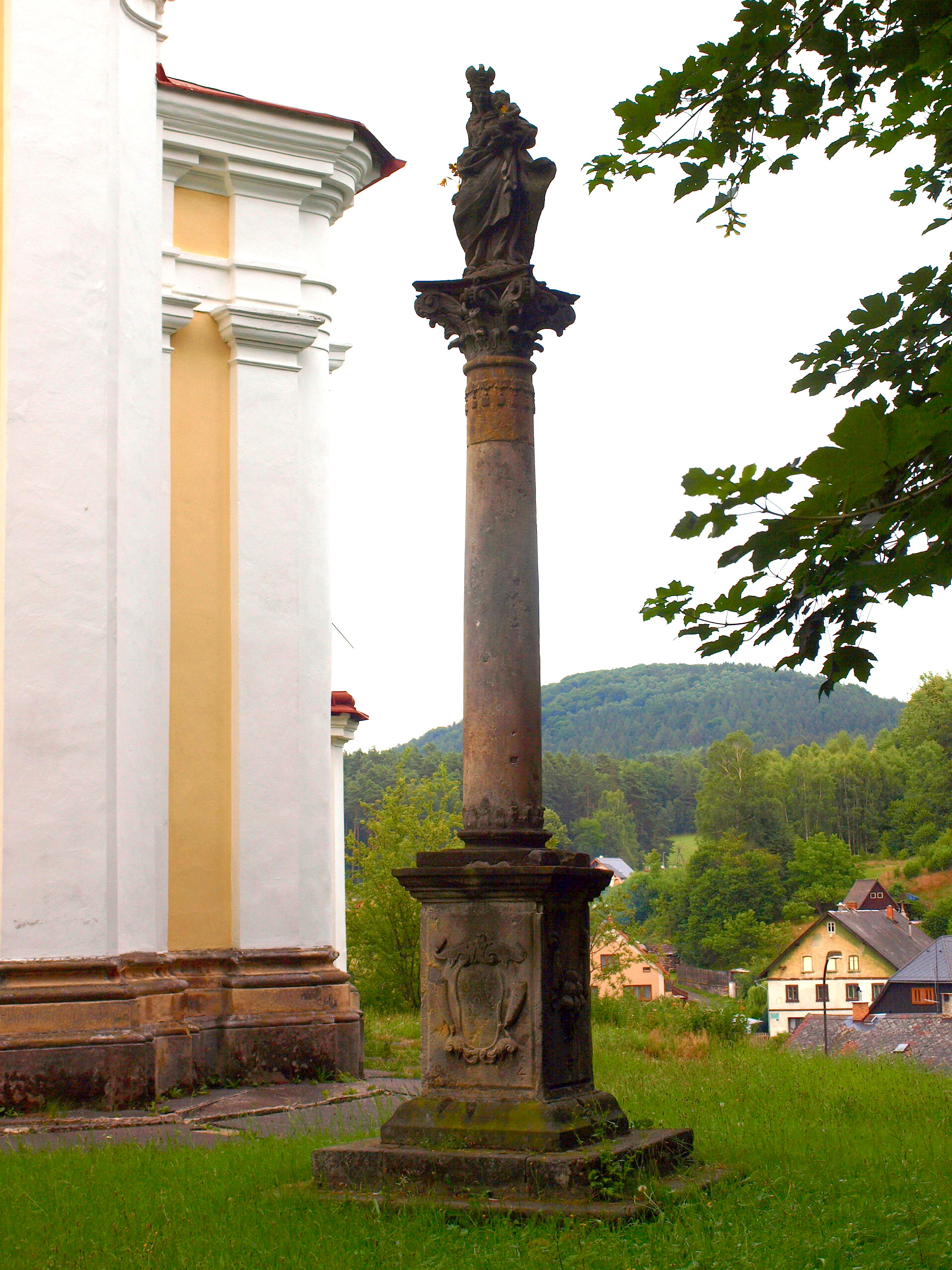 Kostel svaté Kateřiny ve Sloupu